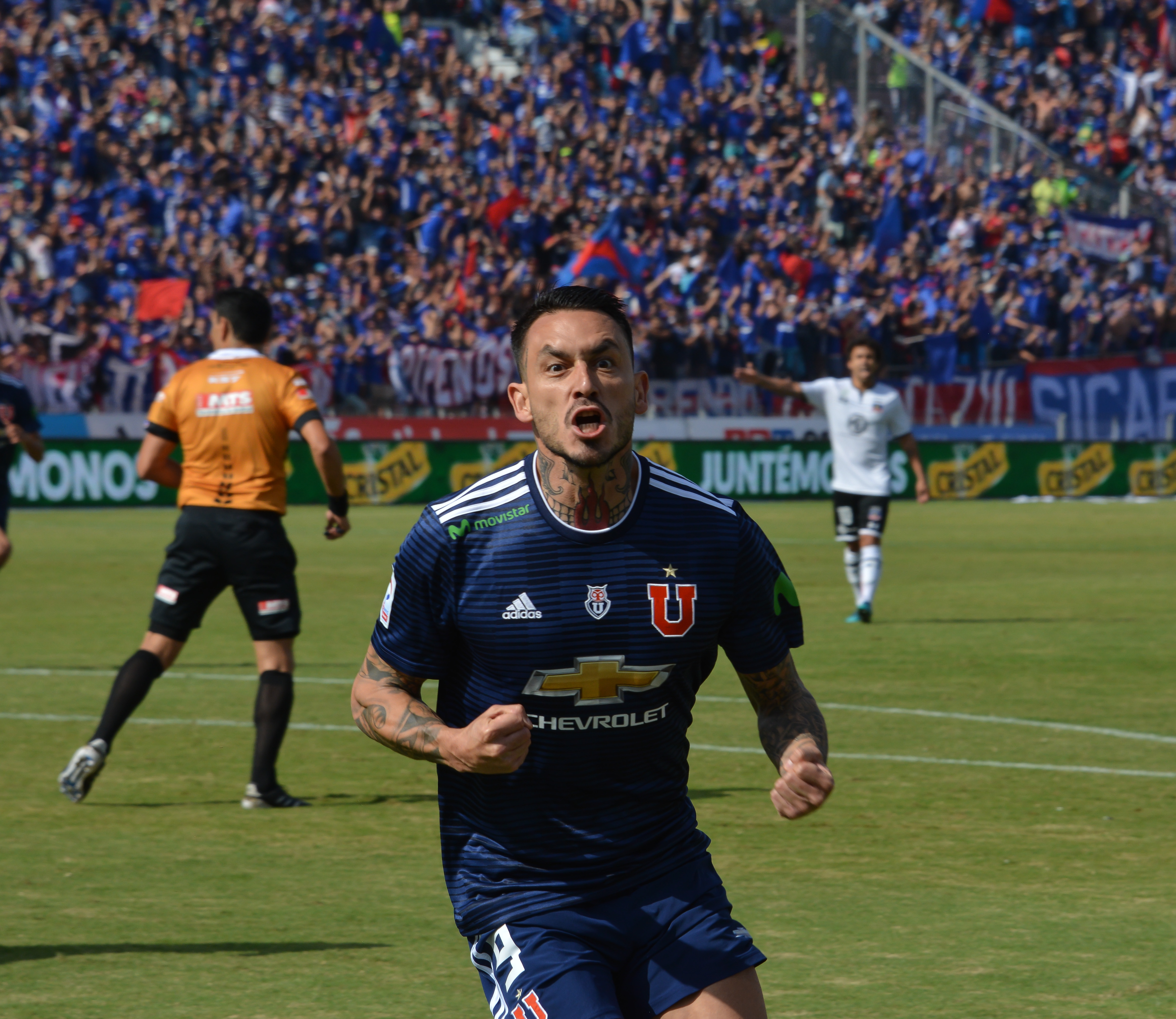 Universidad de Chile v Colo-Colo, Estadio Nacional, Santiago, Chile.